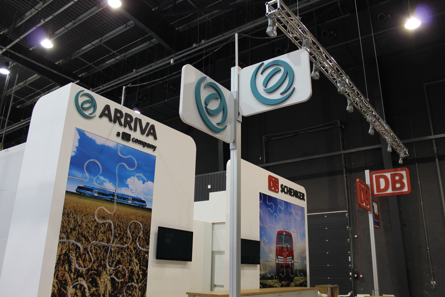 Wspólne stoisko Arrivy i DB Schenker podczas targów Trako 2015. The making of this document was supported by Wikimedia Polska Association, within Wikigrant no. WG 2015-34.